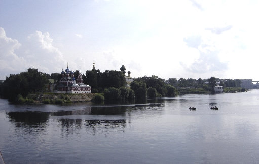 La Volga à Ouglitch (Nord de Moscou)